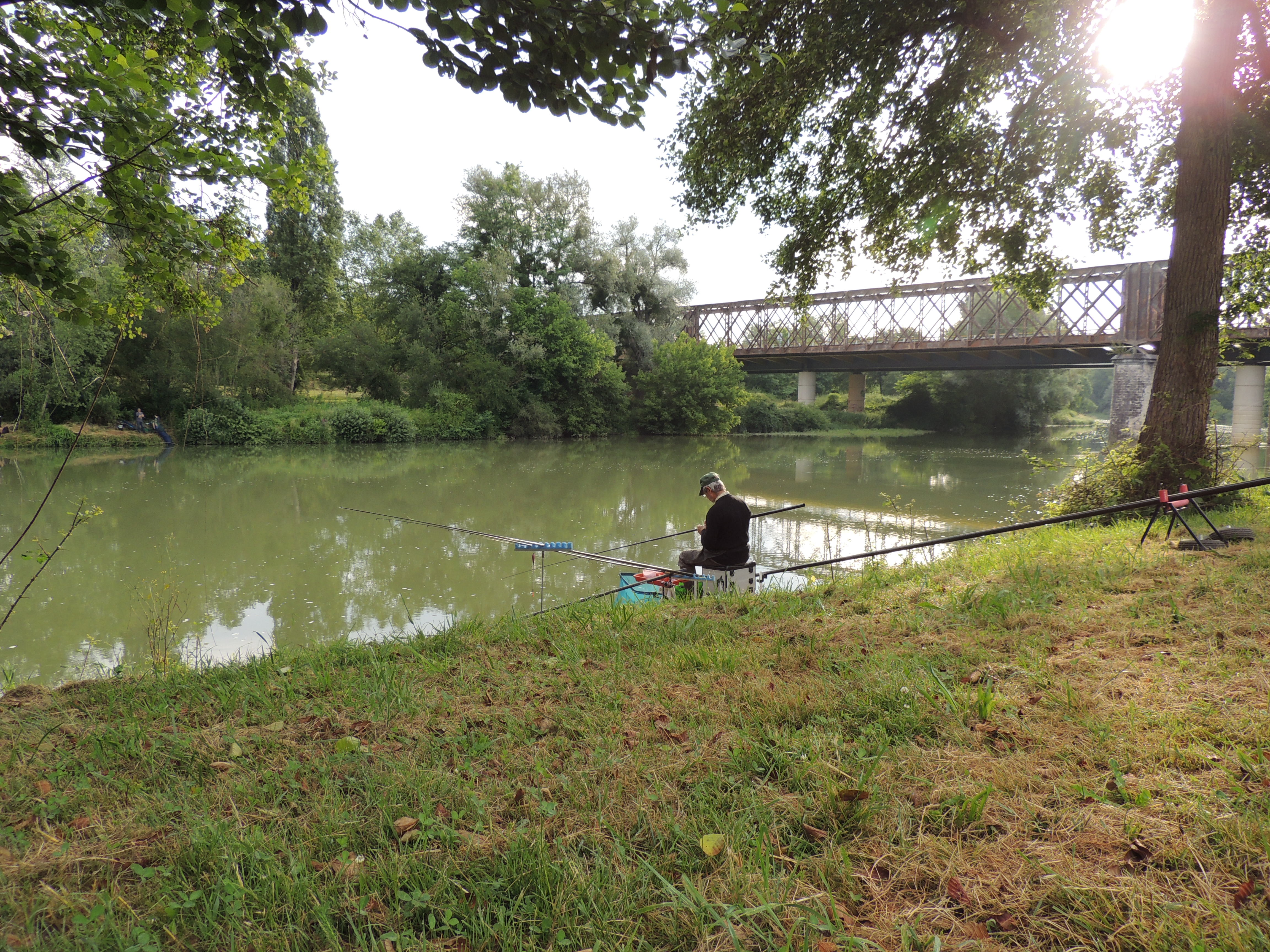 Berges de l'Adour lors du concours de pêche des Fêtes de la Saint-Jean 2019 à Saint-Sever